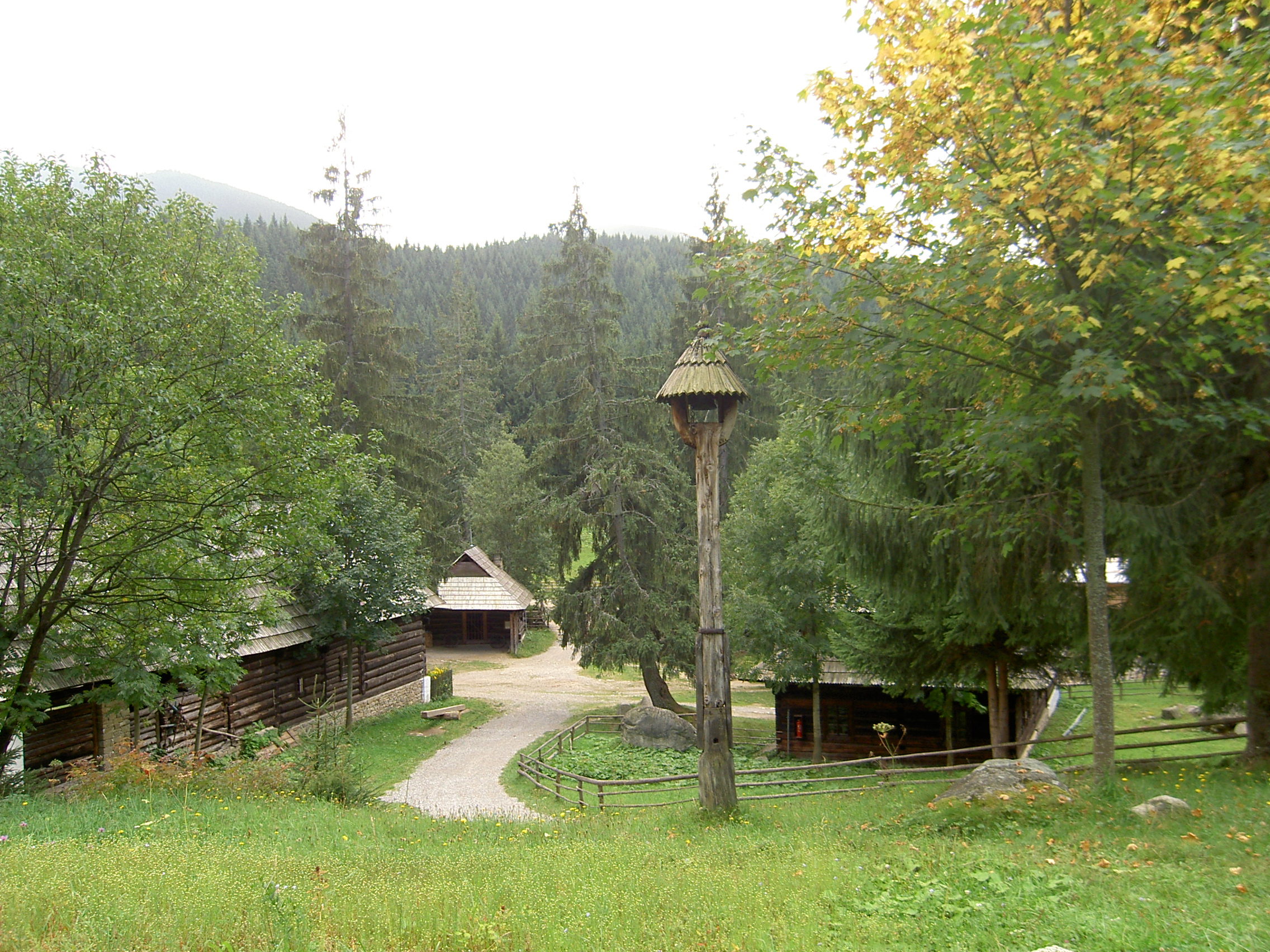 Múzeum oravskej dediny Zuberec - Brestová